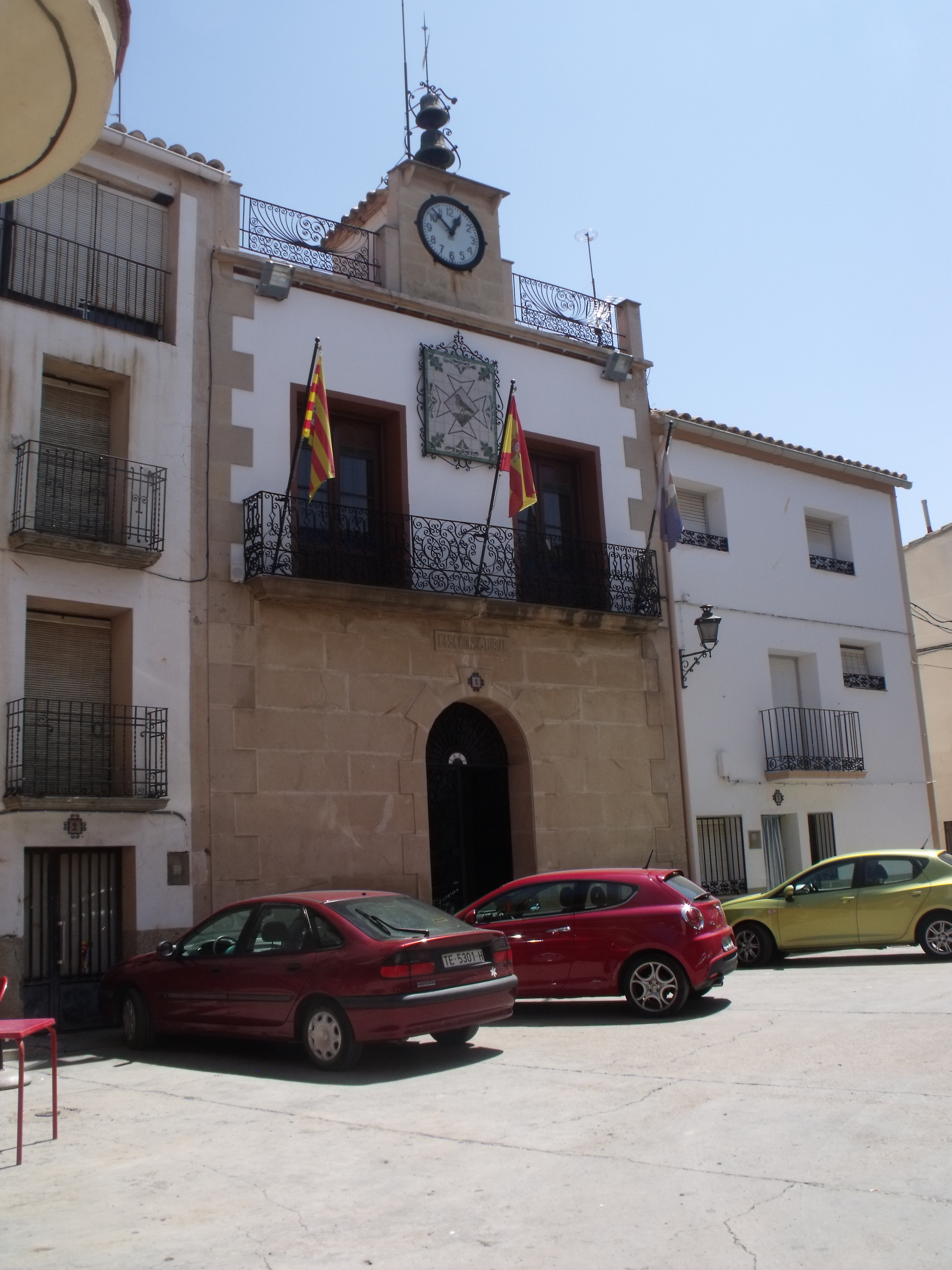 Ayuntamiento de Samper de Calanda.